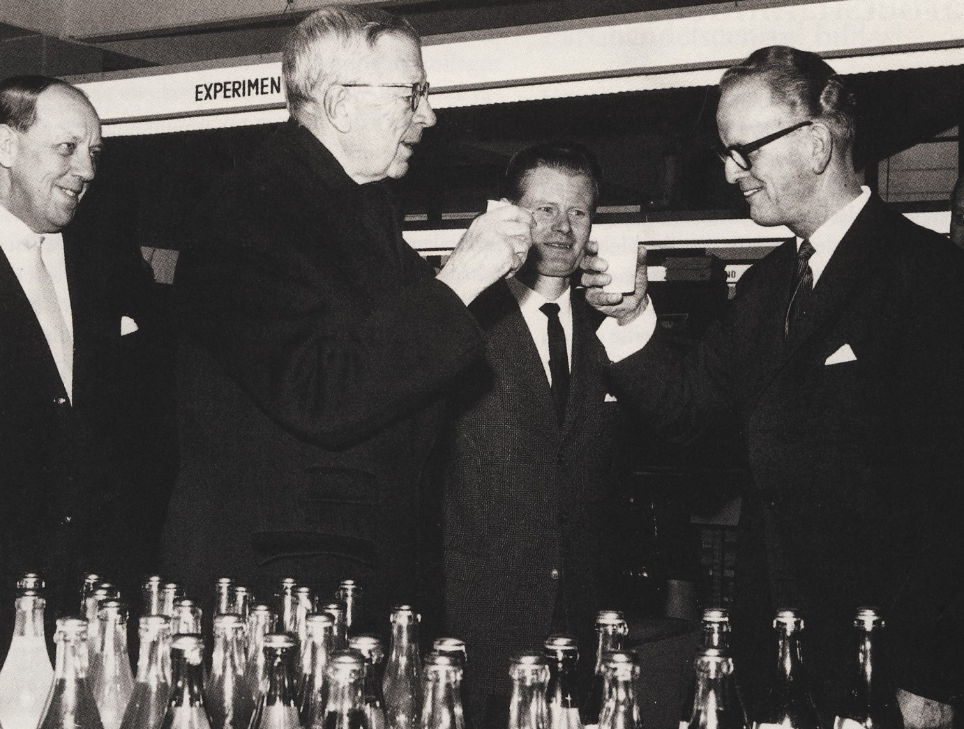 Invigning av Årsta Partihallar etapp 1, den 18 november 1962. Kung Gustav VI Adolf skålar i äppelcider med Trädgårdshallens ordförande Sten Bergman, t.v. Fritz Hargeson och i mitten Bent Ericsson.